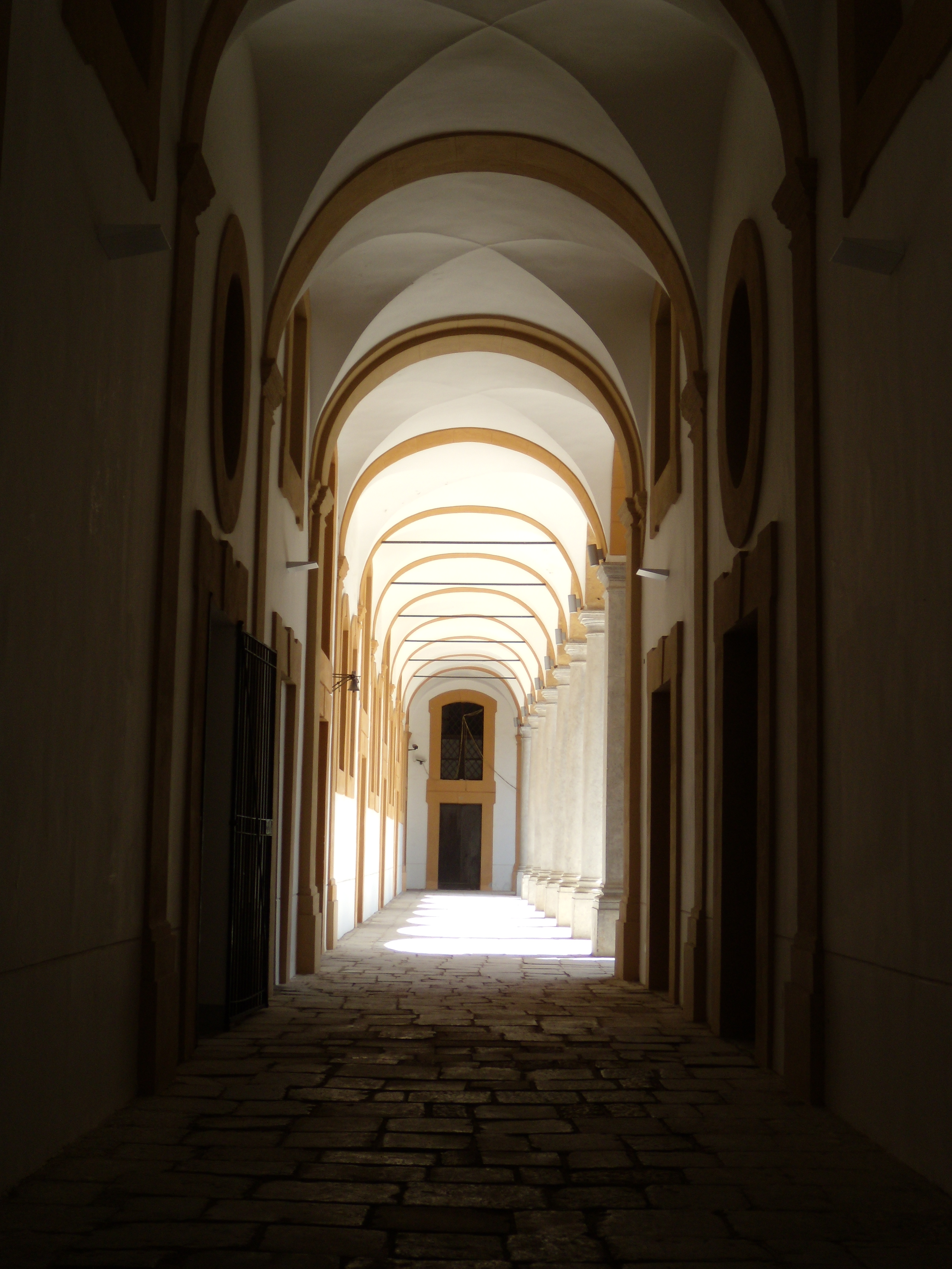 Galleria tra i due cortili dell'Albergo delle Povere (Palermo)